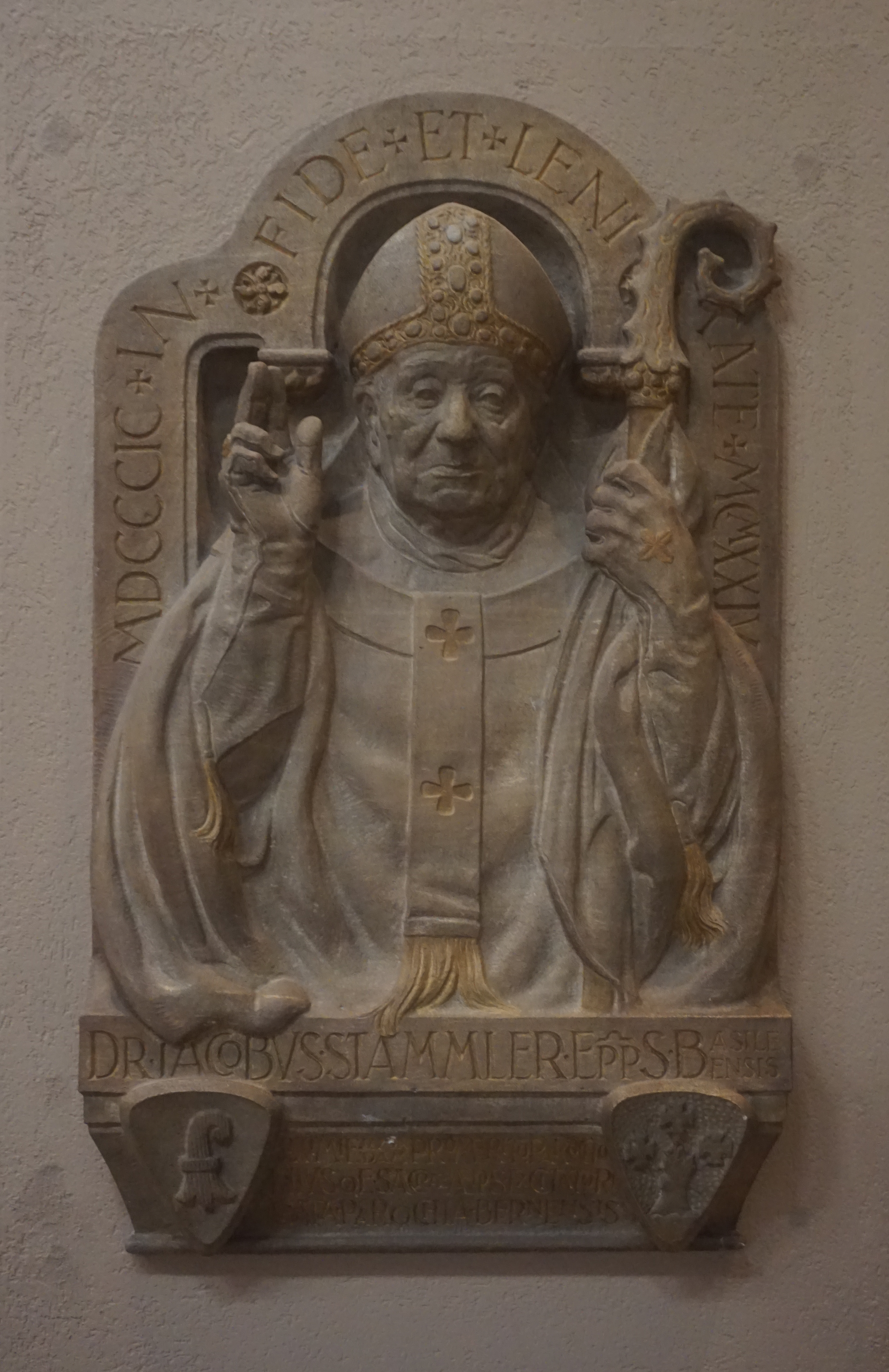 Dreifaltigkeitskirche in Bern, Gedenktafel für Bischof Jakobus Stammler, ehem. Pfarrer von Bern, von Professor August Weckbecker München